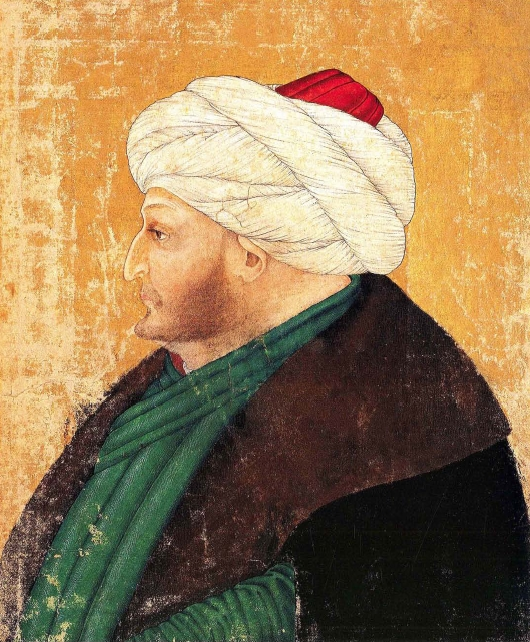 Fatih Sultan Mehmed'in çok az bilinen çizimi. 15. yy İstanbul Saray Albümü Hazine 2153 Folyo 145ba